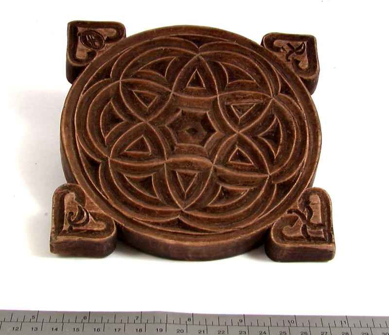 Smørrose skåret i bjørk og datert 1838, fra Flå i Buskerud. Foto Anne-Lise Reinsfelt / Norsk Folkemuseum, NFL.01443.